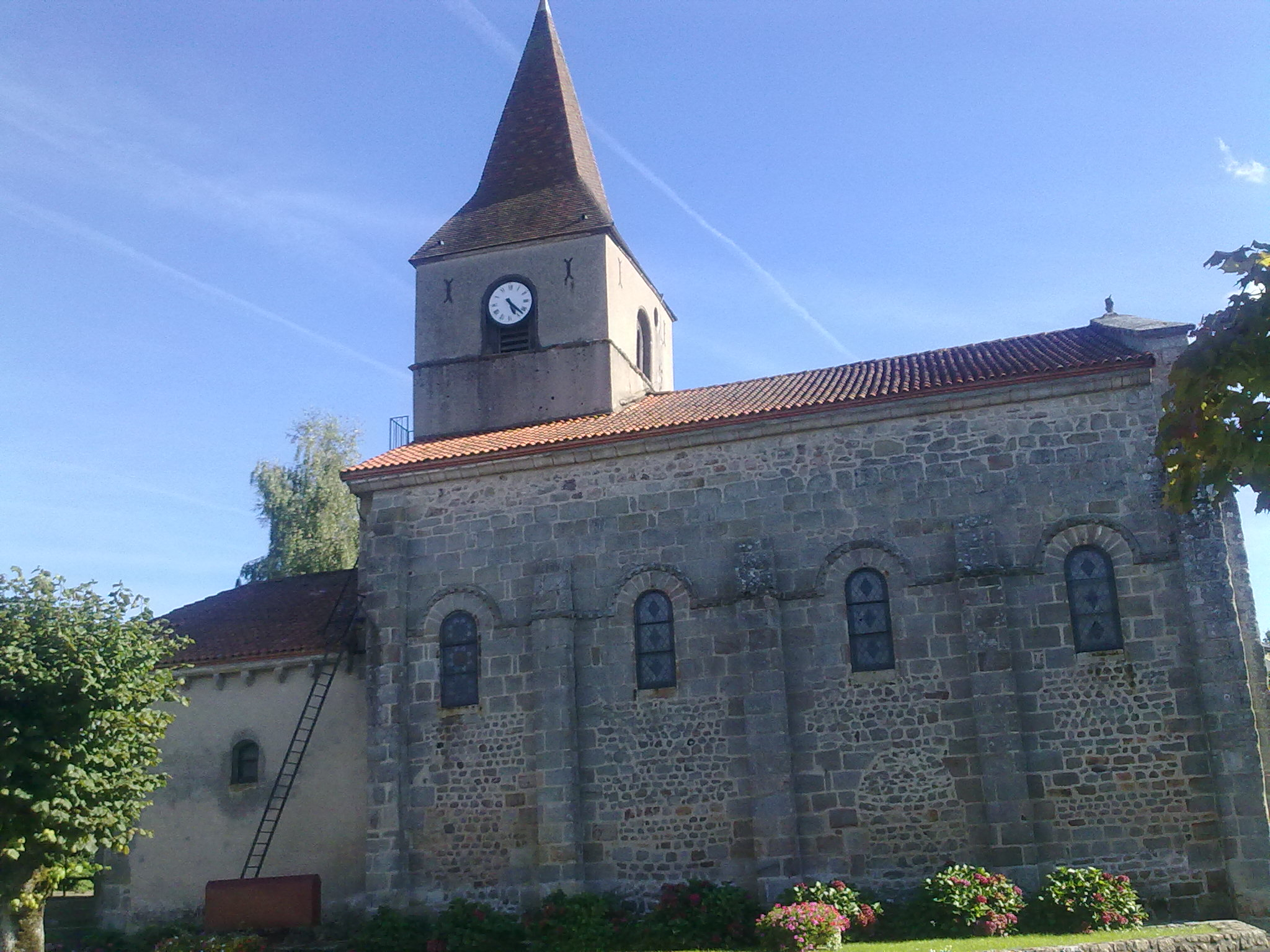 Église Saint-Pierre de Biollet classée en 1961 au titre de monument historique.